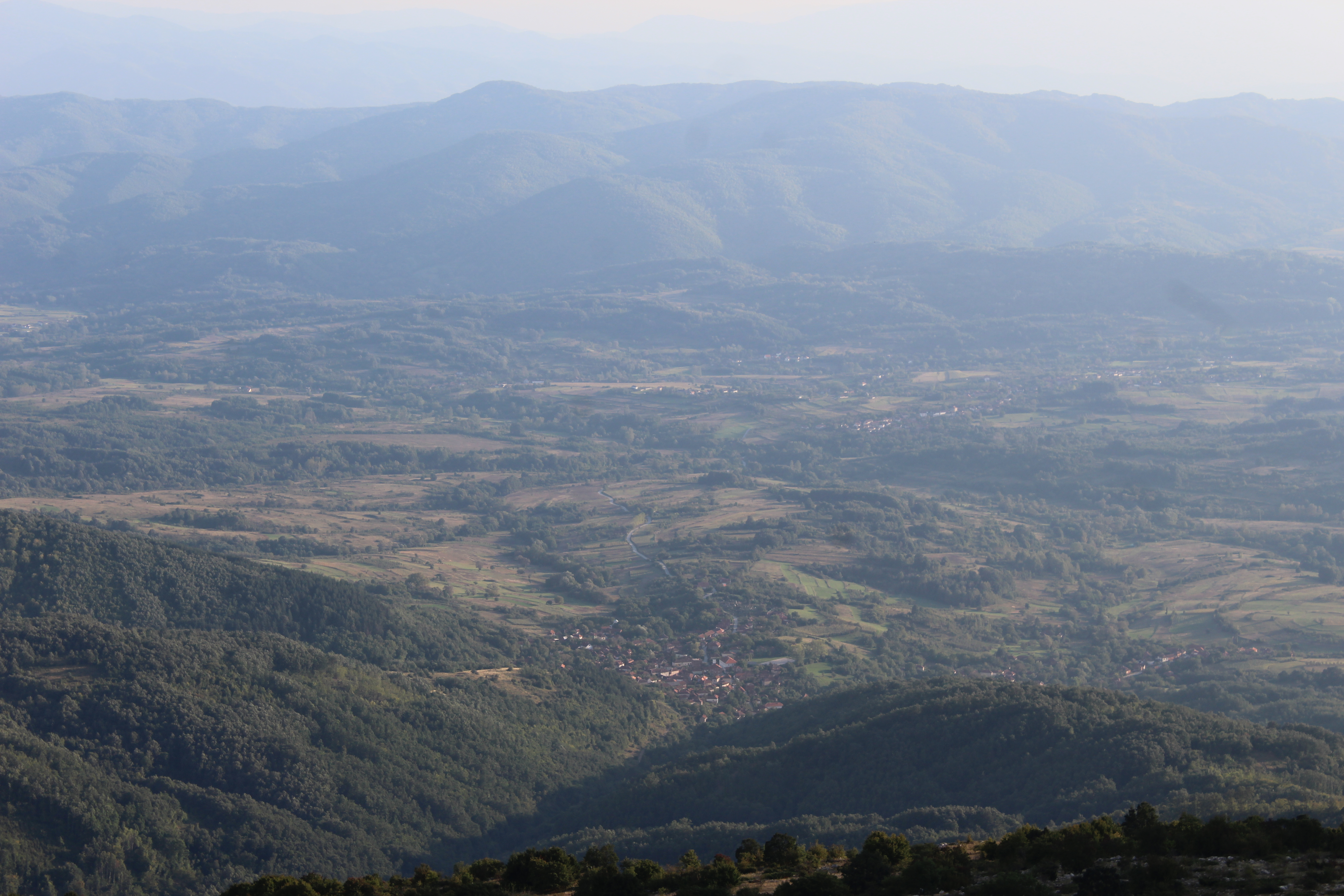 Srpski (latinica): Zaplanjska kotlina viđena sa Suve planine.